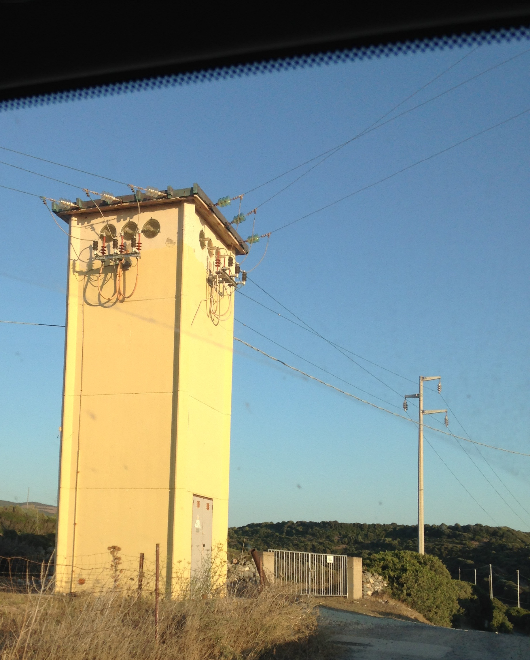 Cabina elettrica nelle campagne di S'Archittu